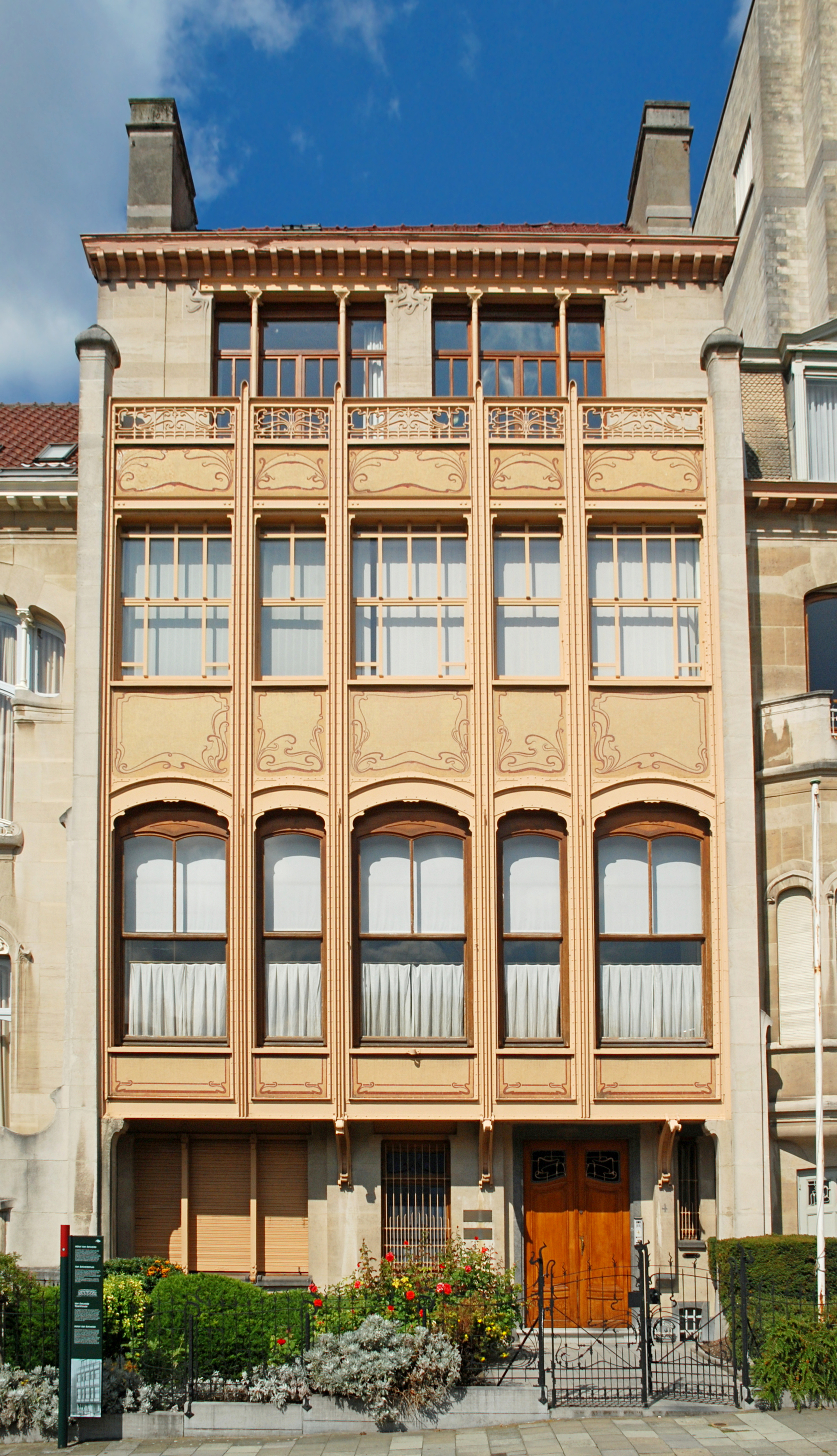 Belgique - Bruxelles - Hôtel Van Eetvelde (Art nouveau - Victor Horta - 1895)